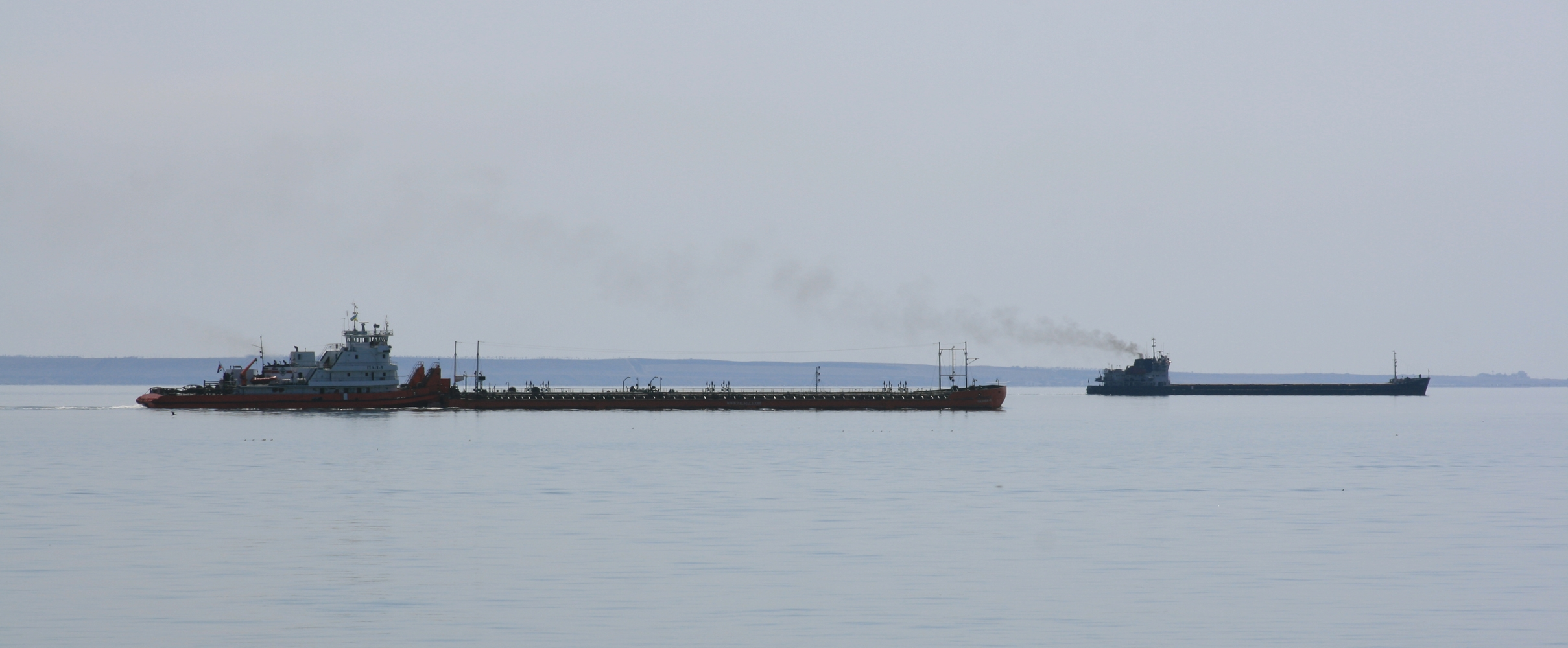 Корабли в Керченском проливе, вид от крепости Ени-Кале